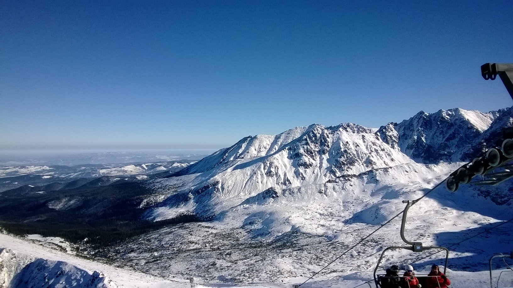 Kasprowy Wierch This is a photography of protected area with CRFOP ID PL.ZIPOP.1393.PN.14